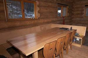 Fay Hut Dining Area